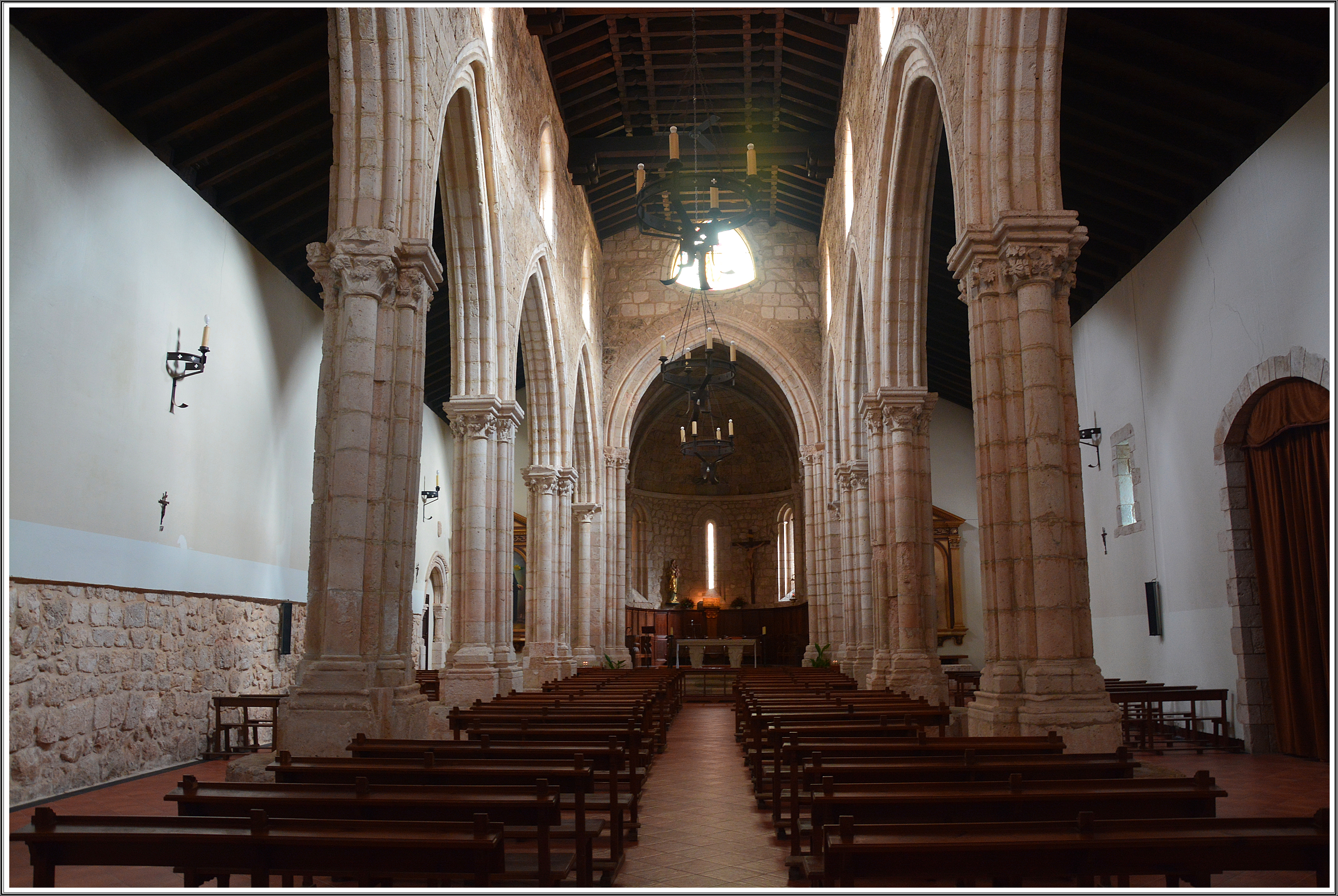 Brihuega - Iglesia de San Felipe La Iglesia de San Felipe data del siglo XIII y es una bella muestra del estilo románico en transición con el gótico. Consta de tres naves siendo la central la más grande. Estas naves están separadas entre sí por cinco arcos sostenidos cuyas columnas constan de capiteles con motivos florales. En su historia ha pasado por diversas vicisitudes. Durante la Guerra de Sucesión (1710) sufrió graves daños, en 1904 quedó gravemente dañada a causa de un incendio y durante la Guerra Civil fue utilizada como almacén de piensos. Pese a ello, siempre ha sido reconstruida conservando su esbeltez y sobriedad, mostrándose como un singular ejemplo del románico español y una de las construcciones más emblemáticas de Brihuega.